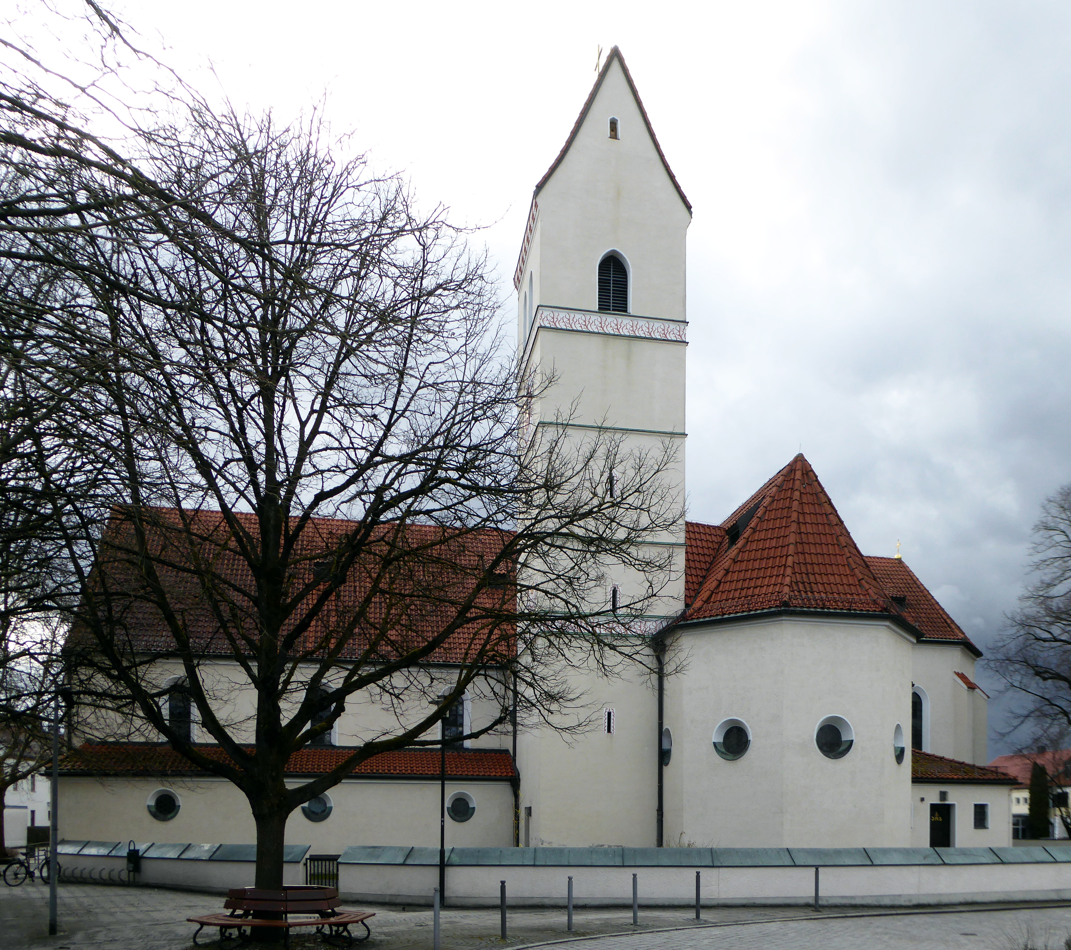 Feldkirchen (Lkr. München), Kirche Jakobus der Ältere, von Ost-Nord-Osten.